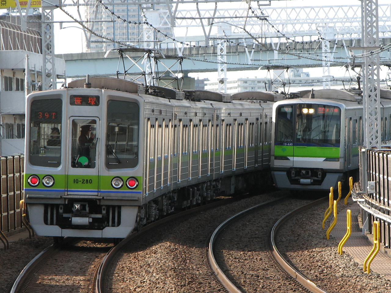 都営新宿線を走行する都営10-000形車両（左）と都営10-300形車両